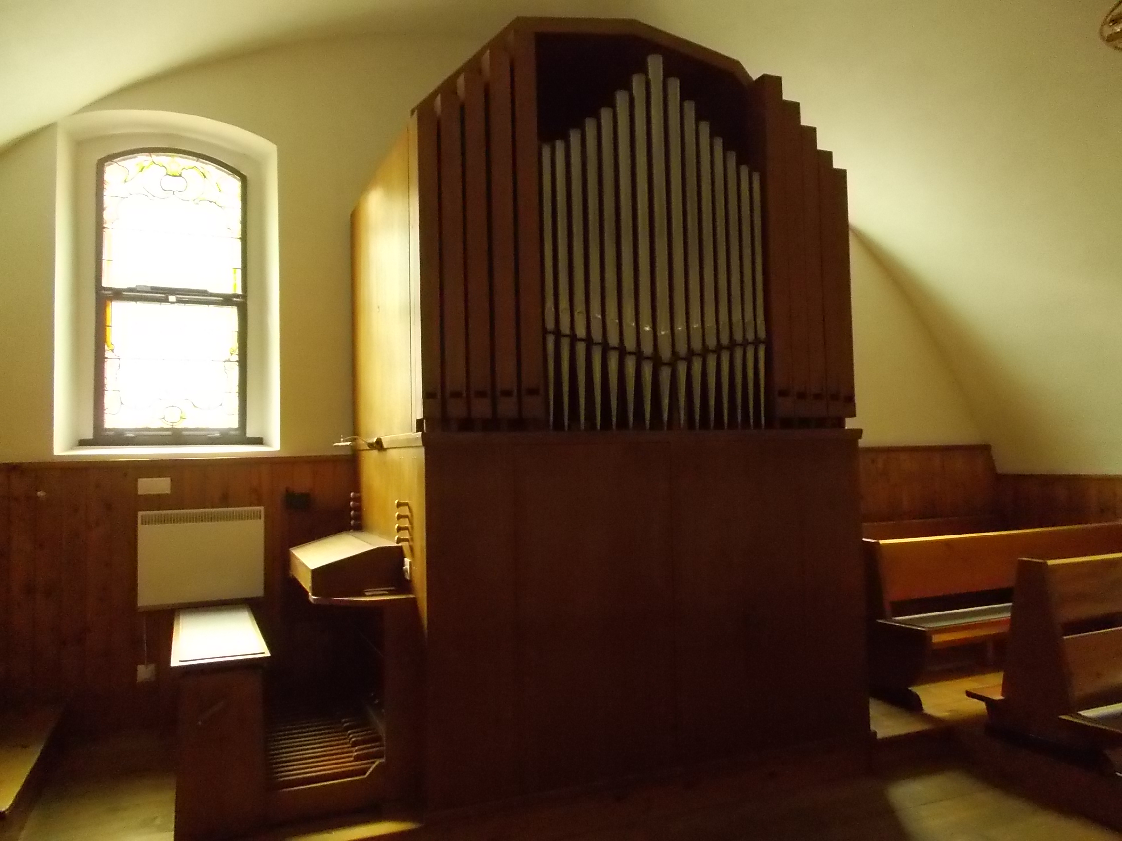 Walcker-Orgel von 1960